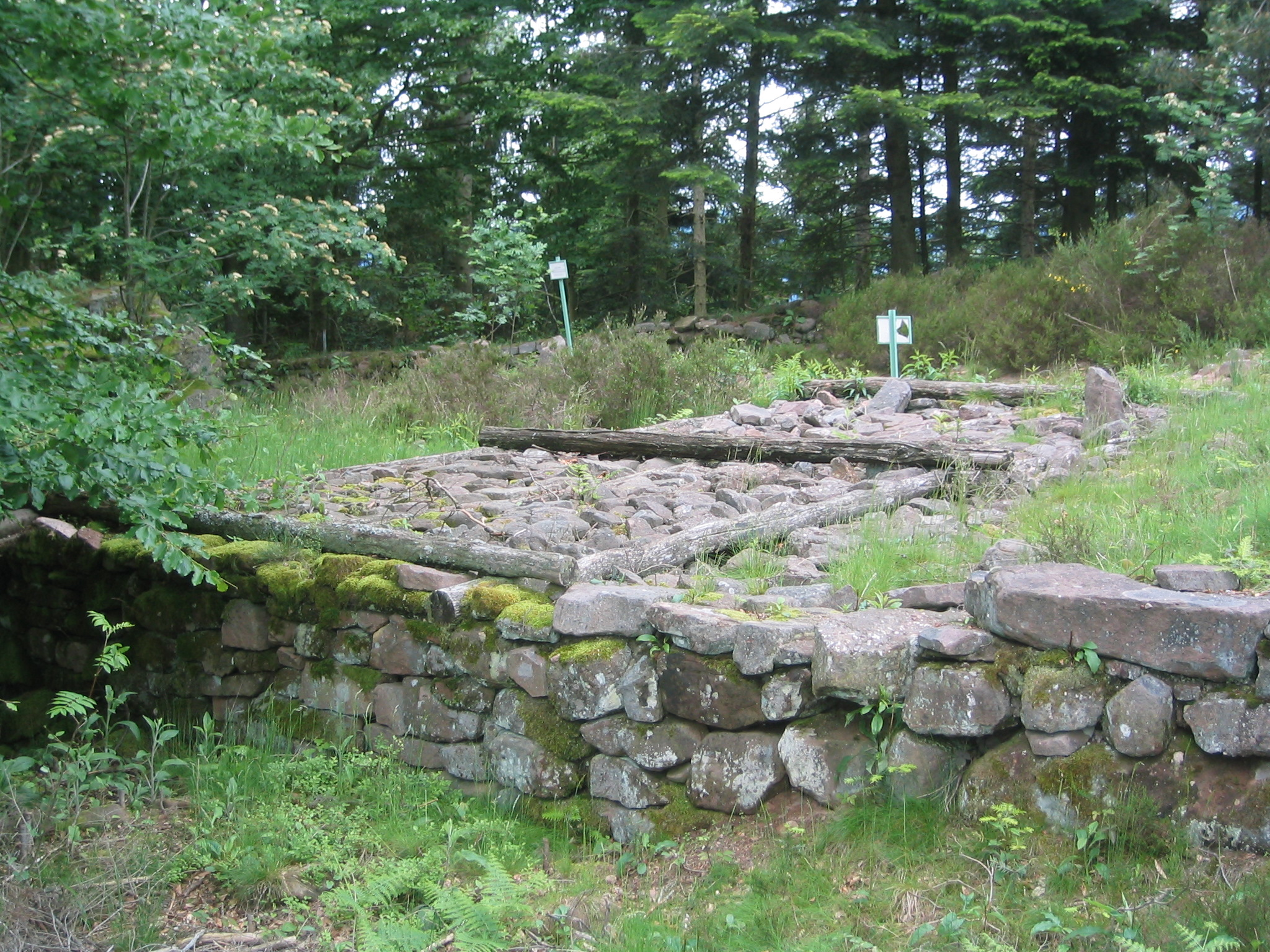 Murus gallicus au Camp celtique de la Bure (Saint-Dié-des-Vosges, Vosges, France) : rempart coudé ; les pierres sèches sont bridées par des lits de poutres en chêne (Ier siècle avant J.C.)